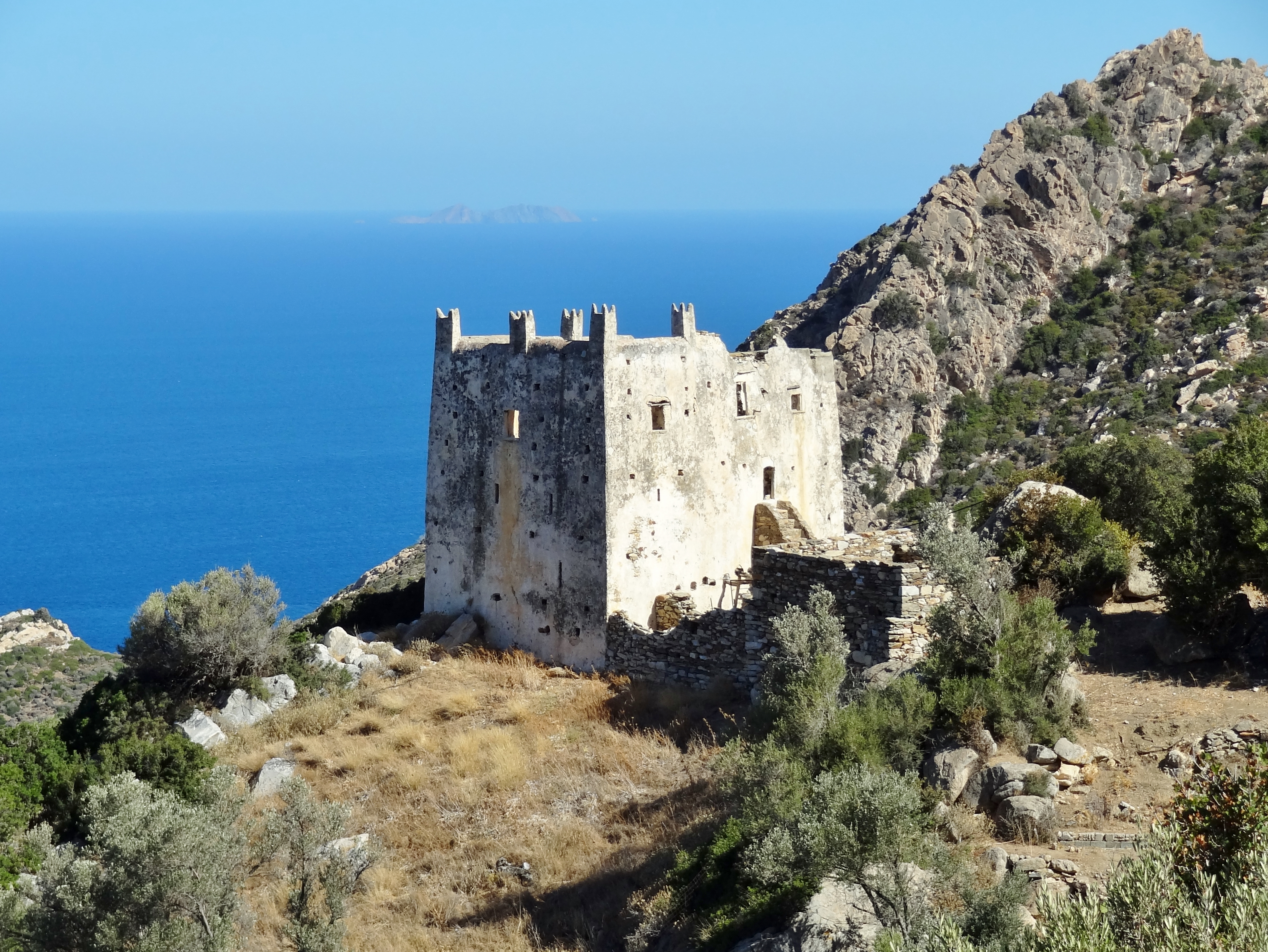 Venezianischer Turm von Agia, Naxos, Kykladen, Griechenland